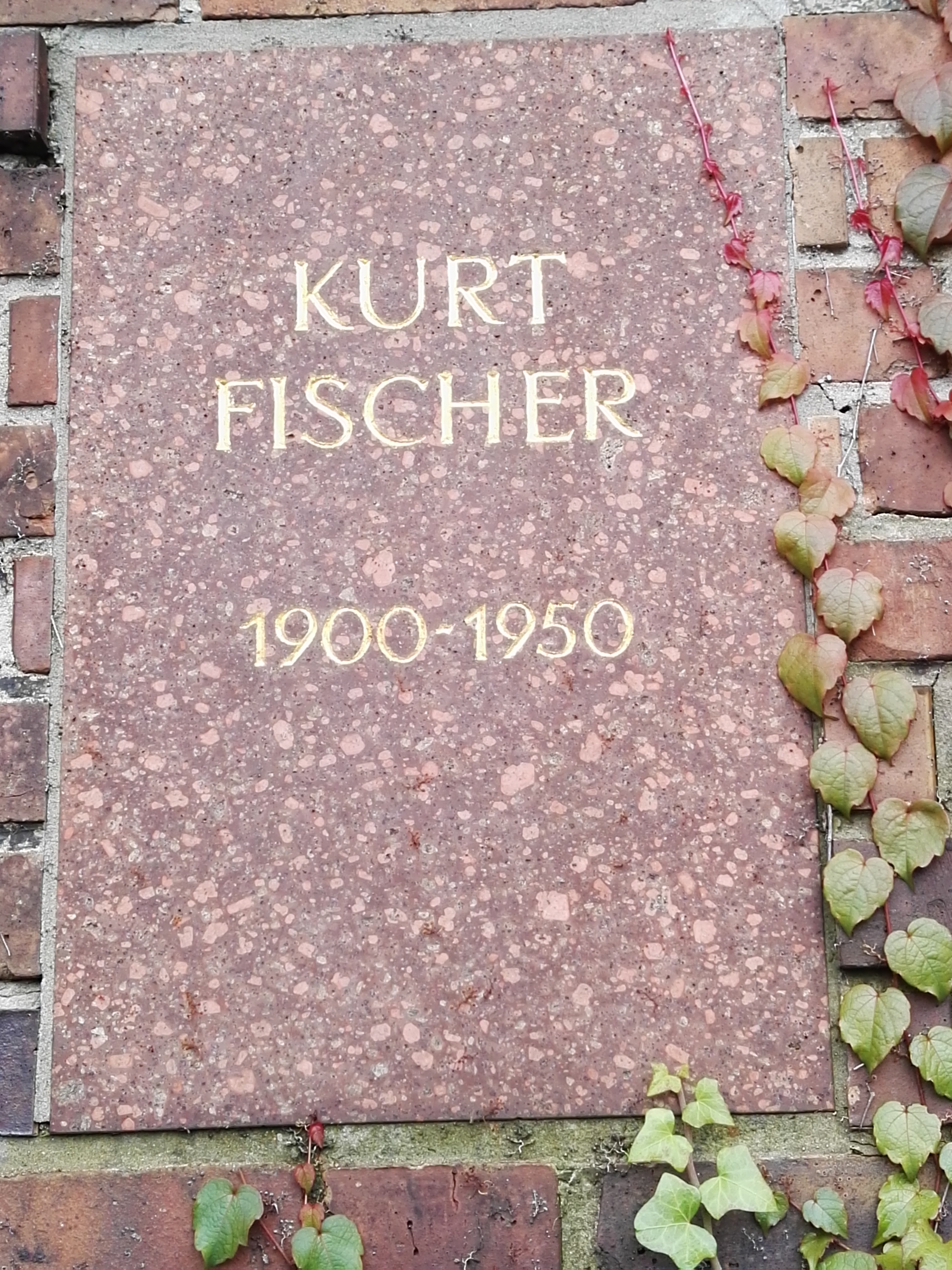 Grab von Kurt Fischer in der Gedenkstätte der Sozialisten auf dem Zentralfriedhof Friedrichsfelde in Berlin-Lichtenberg